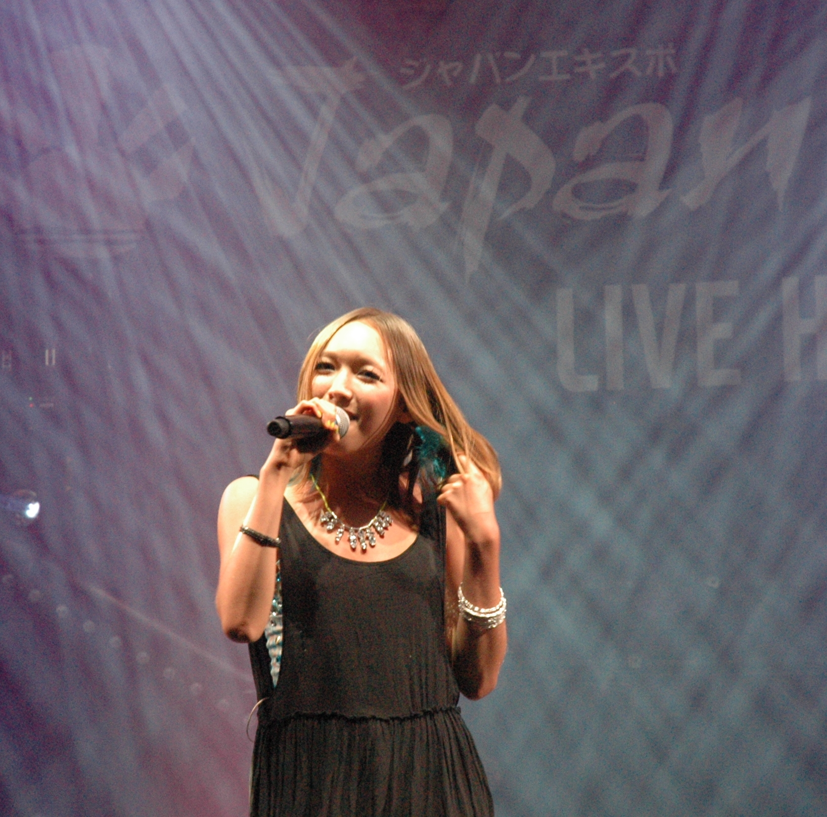 Kylee en concert lors de la Japan Expo 2013 à Paris